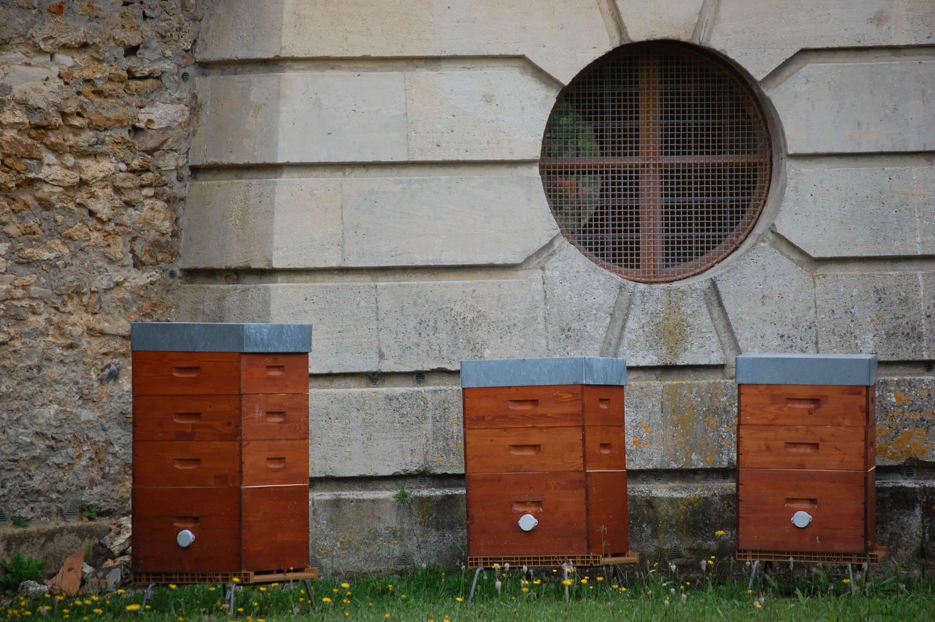 Ruches au pied de la tour de Marlborough